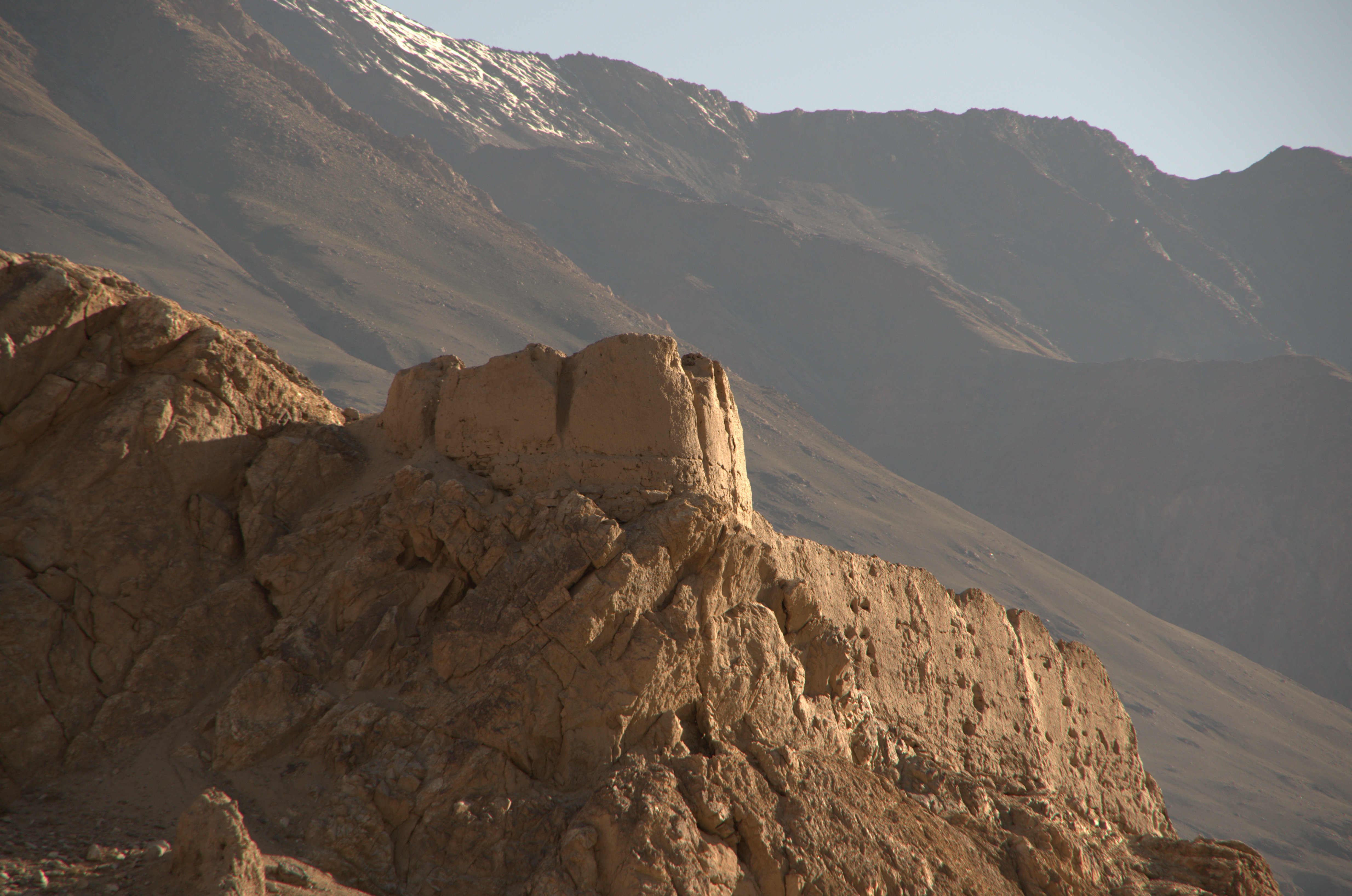 Ruiny twierdzy Kah-Kaha (Qah-Qaha)